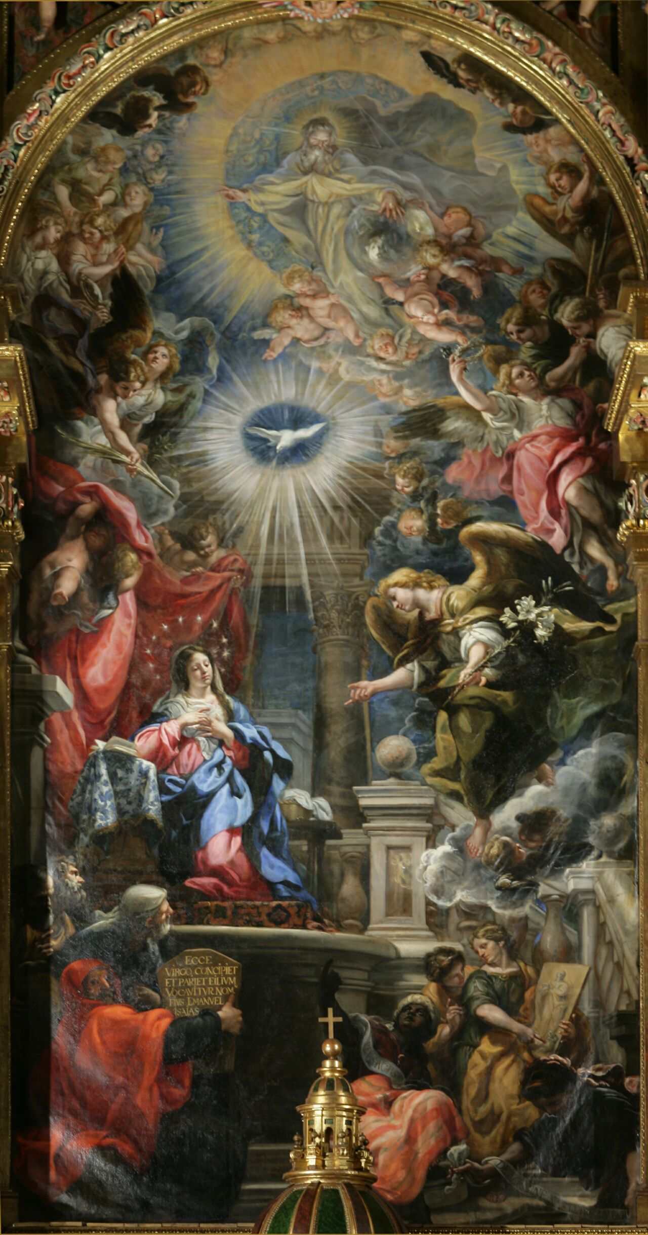 La Anunciación o La Encarnación como el cumplimiento de todas las profecías (detalle), óleo sobre lienzo, 750 x 366 cm, Madrid, iglesia del convento de San Plácido